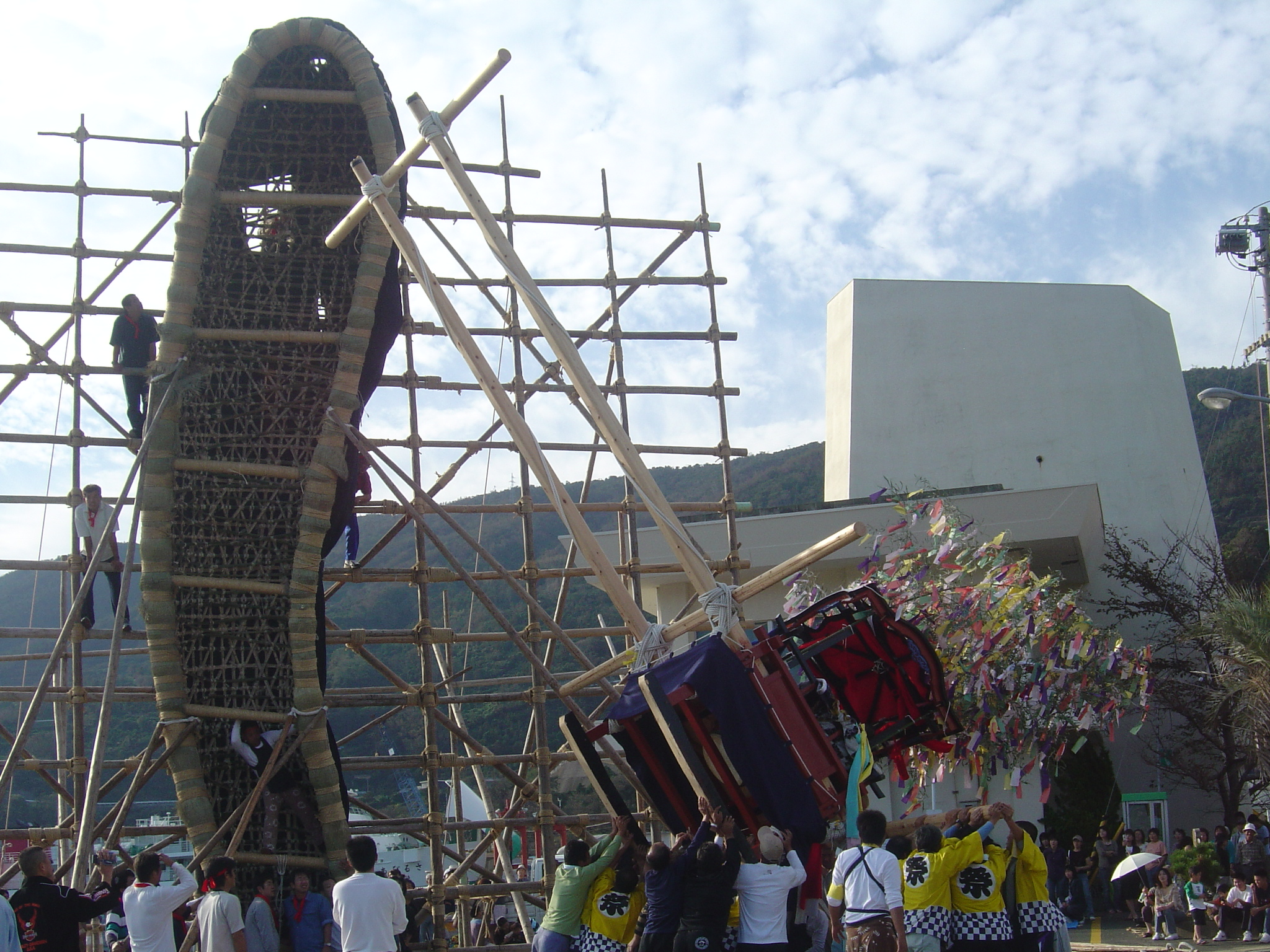 The Misaki Autumn Festival in Ikata, Ehime